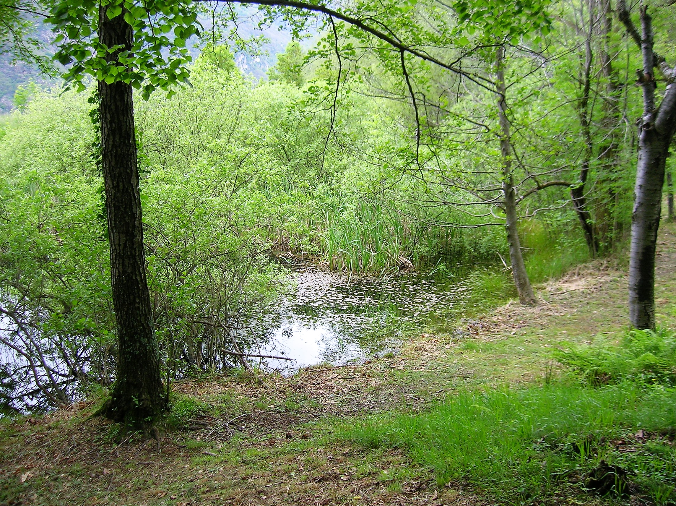 Riserva naturale stagno di Holay, Pont-Saint-Martin, Valle d'Aosta, Italia